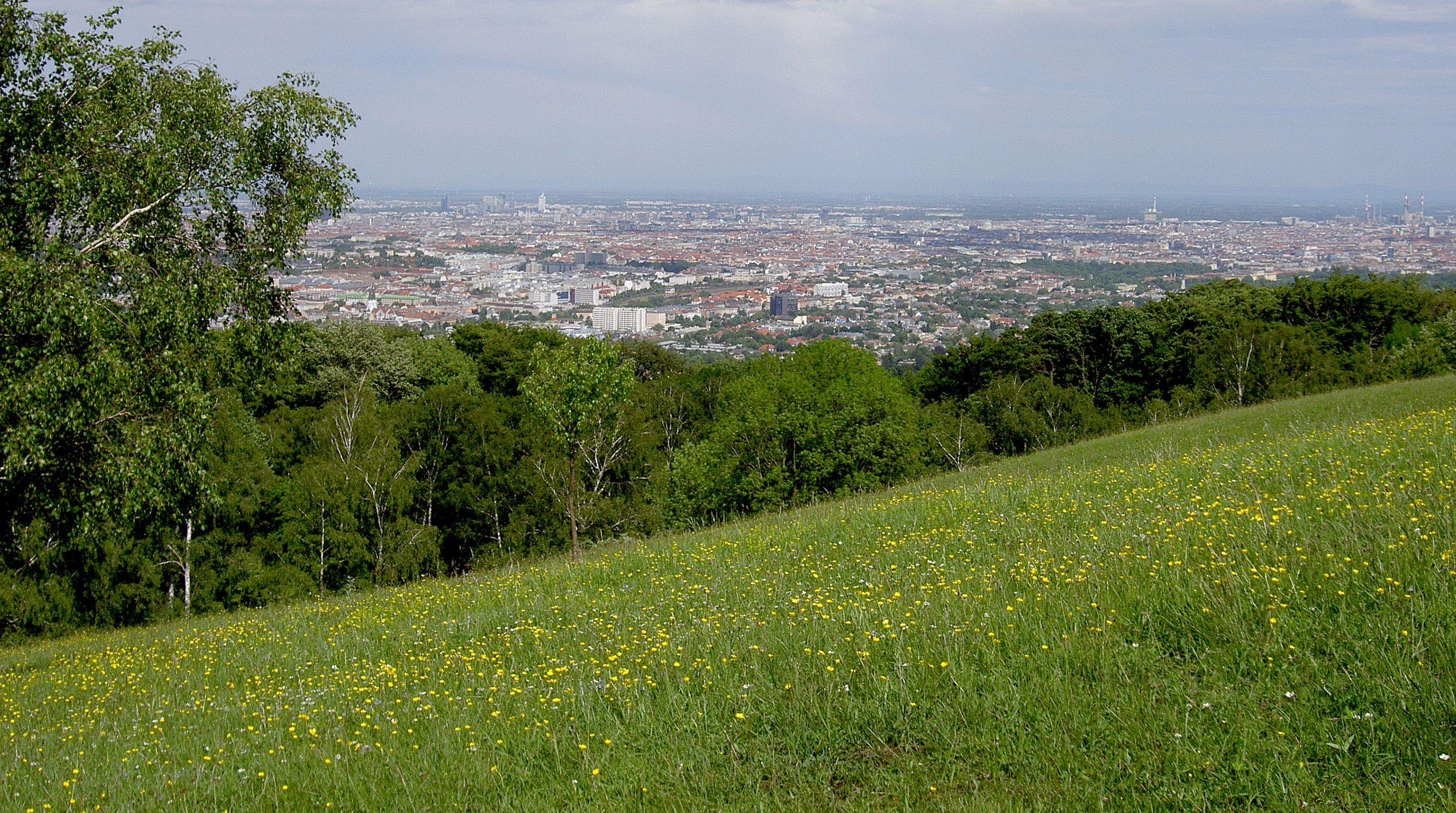 Blick von einer Wiese im Wienerwald auf die österreichische Bundeshauptstadt Wien